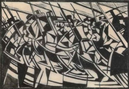 Studie pro ‘Returning to the Trenches’, inkoust na papíru, asi 1914-1916, velikost 13,5 x 19 cm